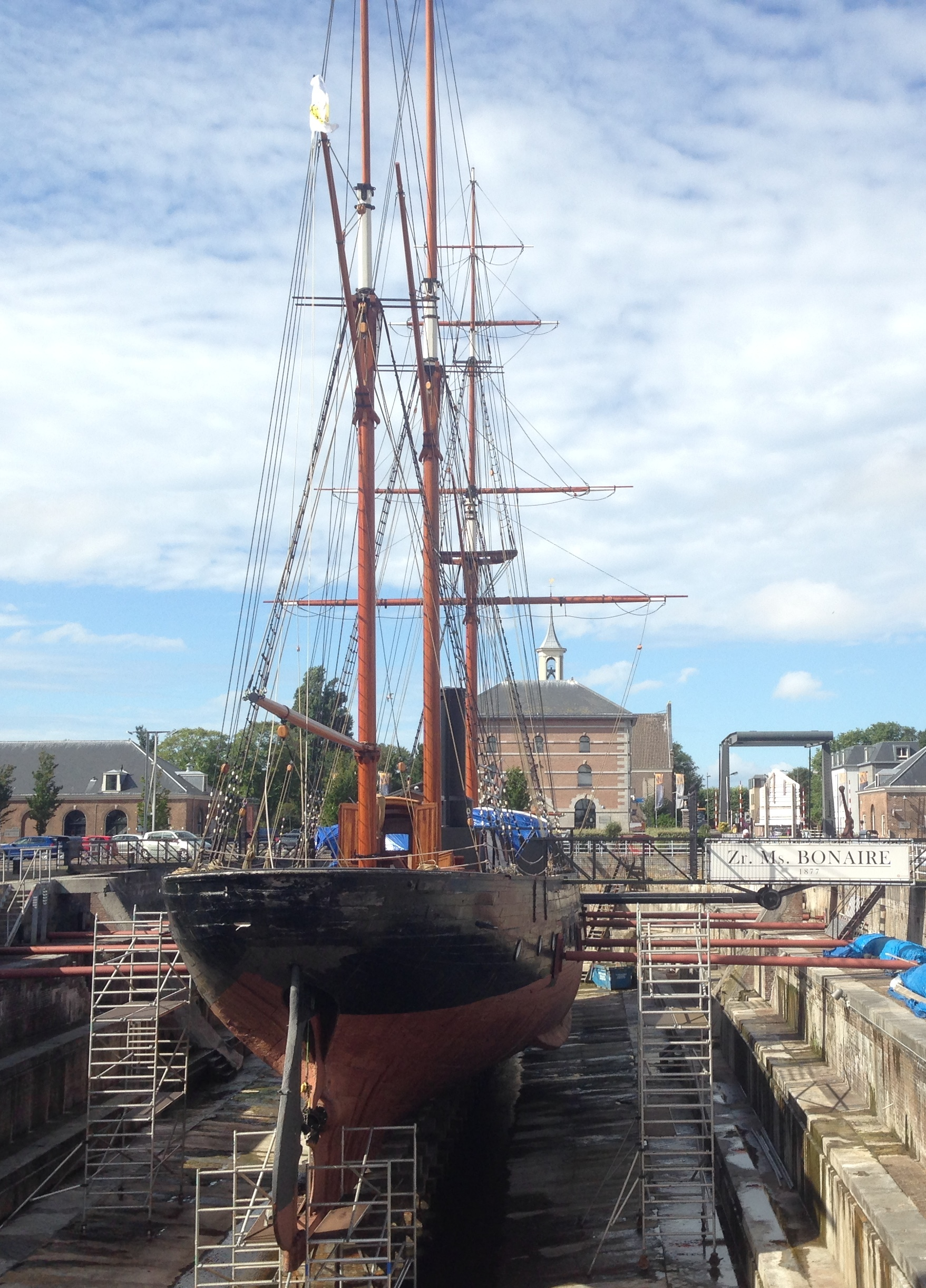 Zr. Ms. Bonaire, 1877, in restauratie sinds 2005